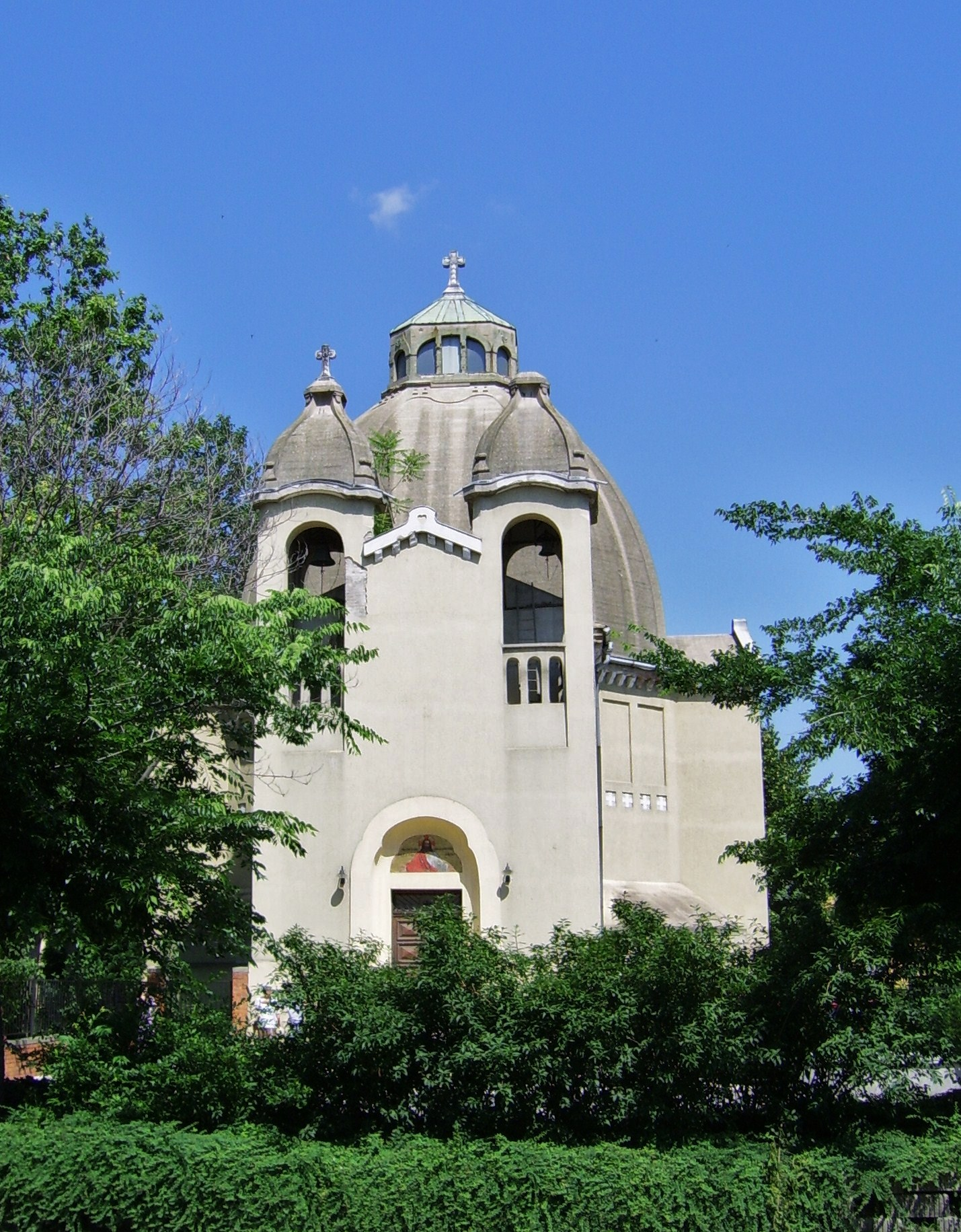 Jézus Szíve templom